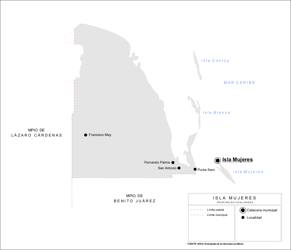 Mapa de las principales localidades del Municipio de Isla Mujeres en el estado de Quintana Roo, México.